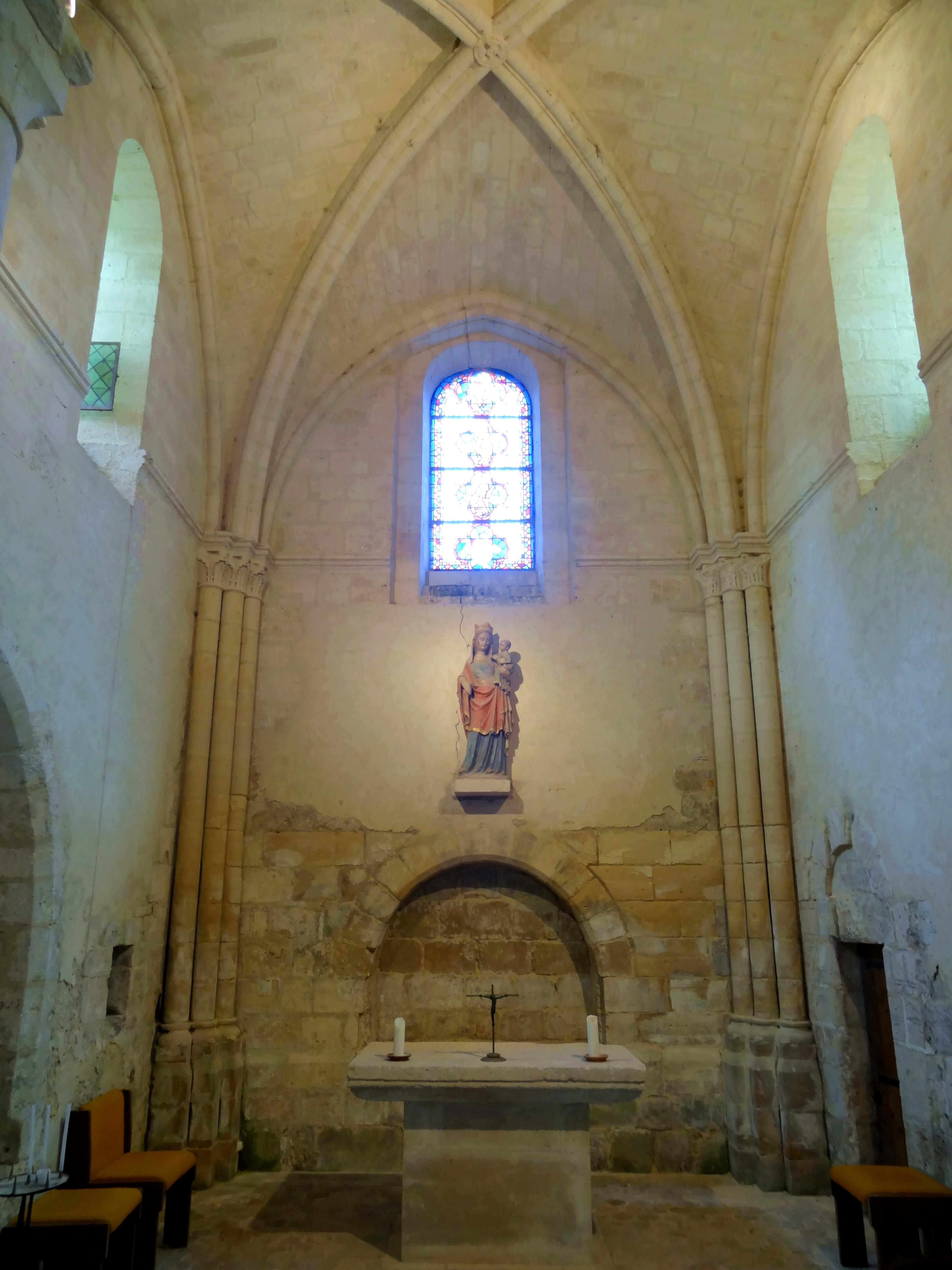 Intérieur de l'église - voir titre.